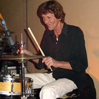 Arjen de drummer, ook voor deze (zelfgemaakte) foto heb ik toestemming gekregen.